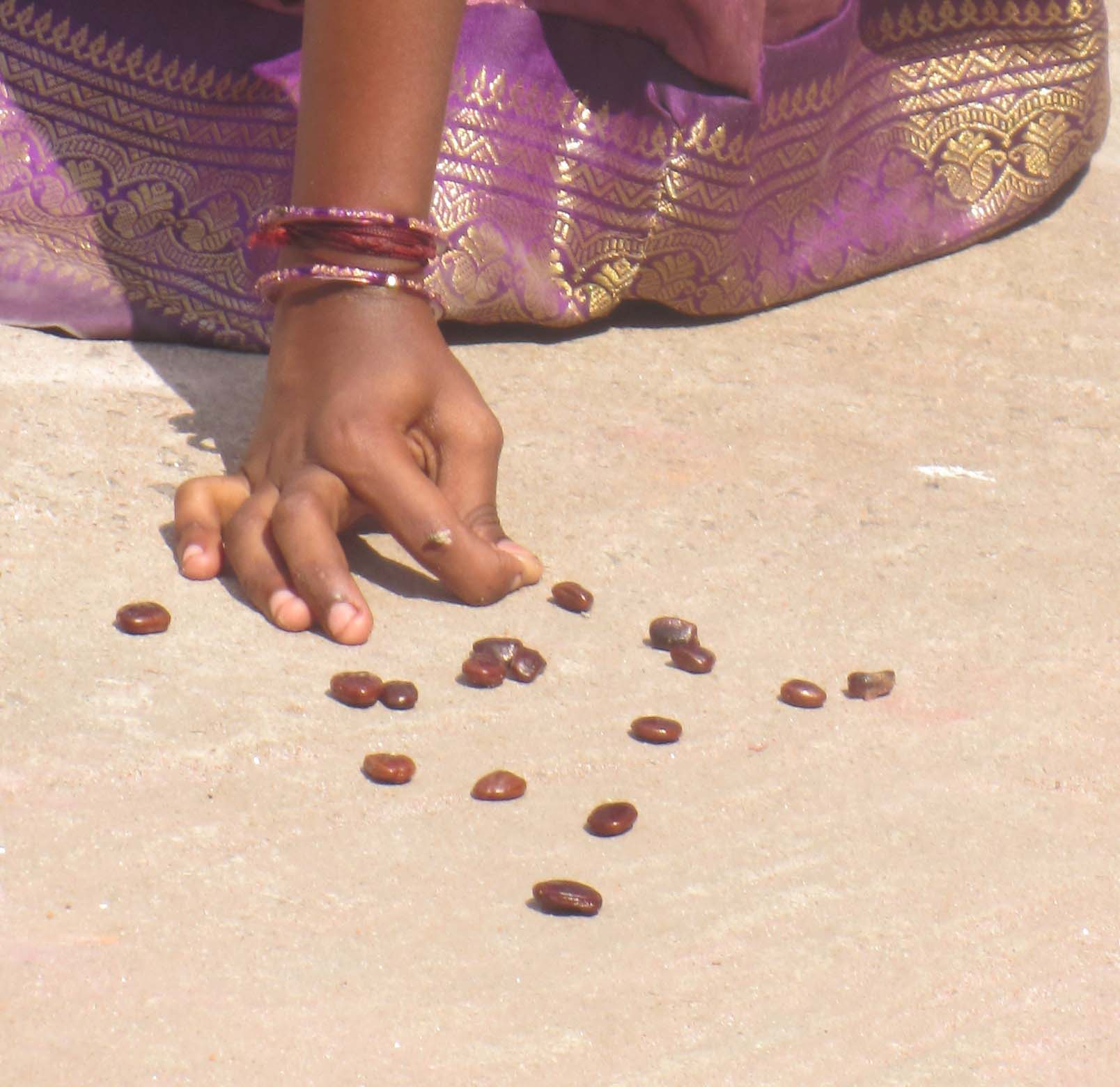 சுண்டு முத்து விளையாட்டில் புளிய முத்துகளைச் சுண்டிஅடித்தல் - own shot